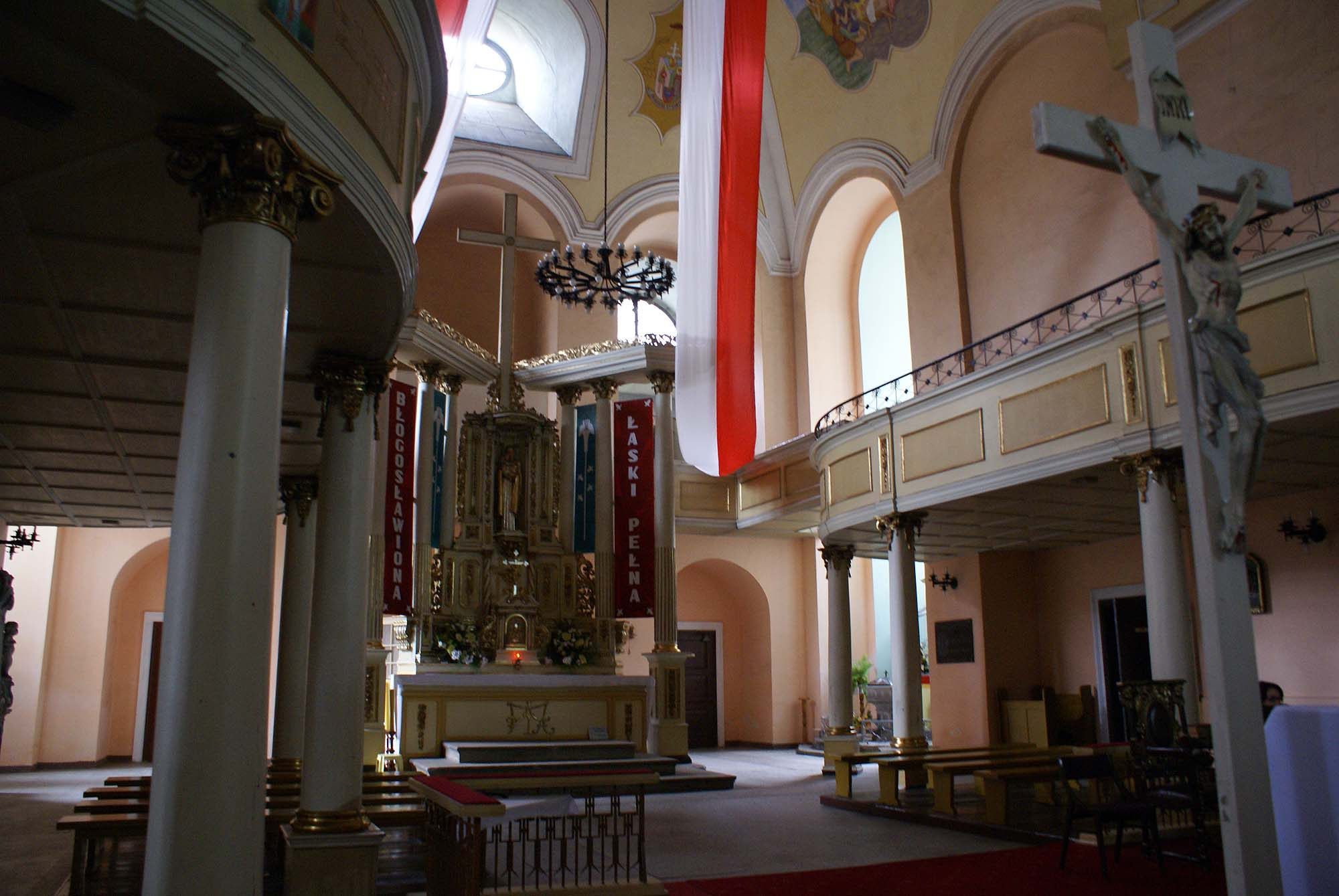 Kamienna Góra, kościół rzym.-kat. par. pw. MB Różańcowej, (d. ewangelicki Kościół Łaski), 1709-1730